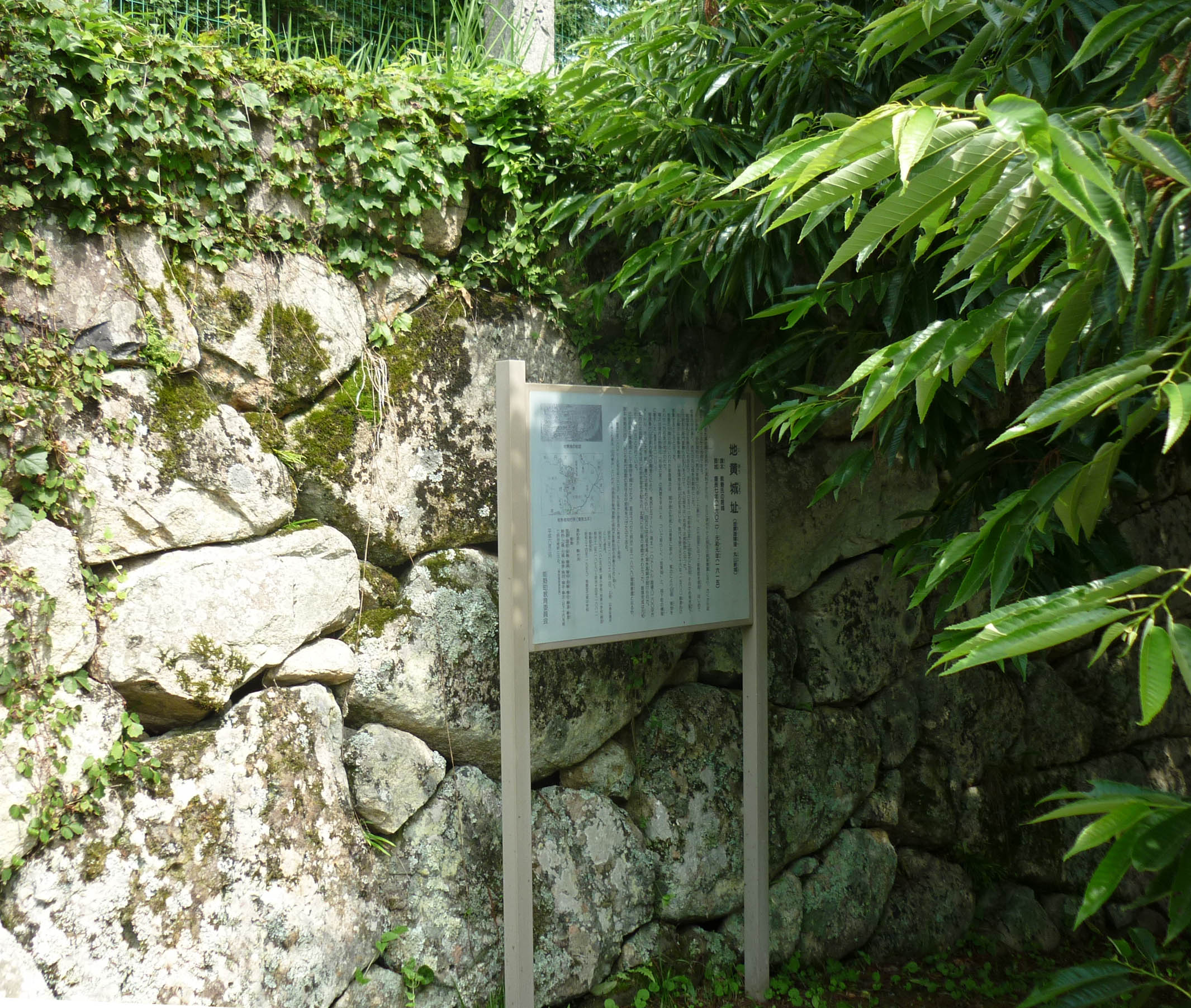 地黄陣屋の案内看板